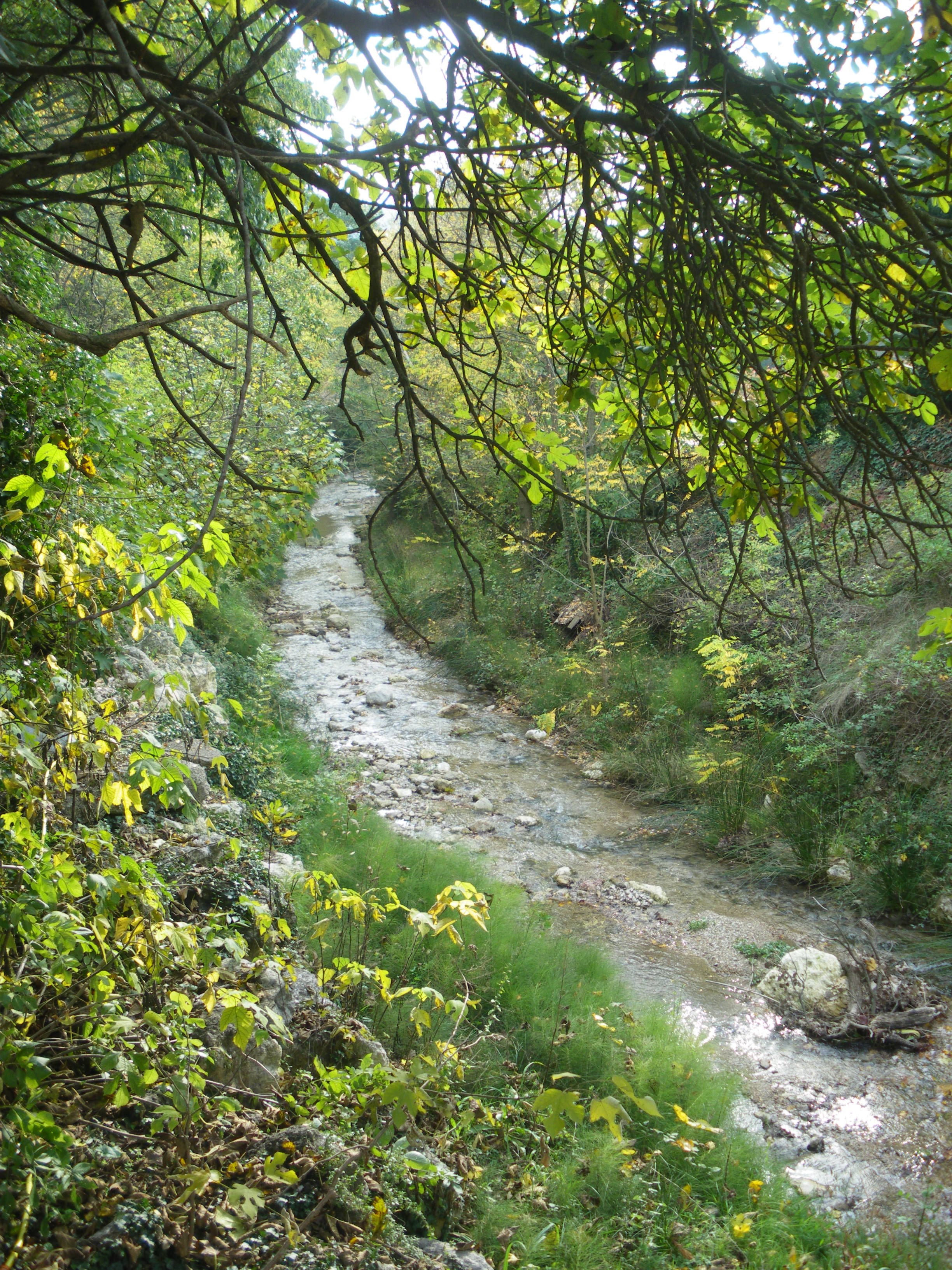 Ruisseau de la Combe, confluent de la Salette, bassin de l'Ouvèze, Vaucluse, France